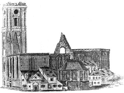 Widok kościoła pw. NMP od południa po pożarze w 1789 r. wg C. Friedricha; za: K. Kalita-Skwirzyńska, 2003.. (Prawdopodobnie prawo autorskie nie obejmuje skanów starych książek).